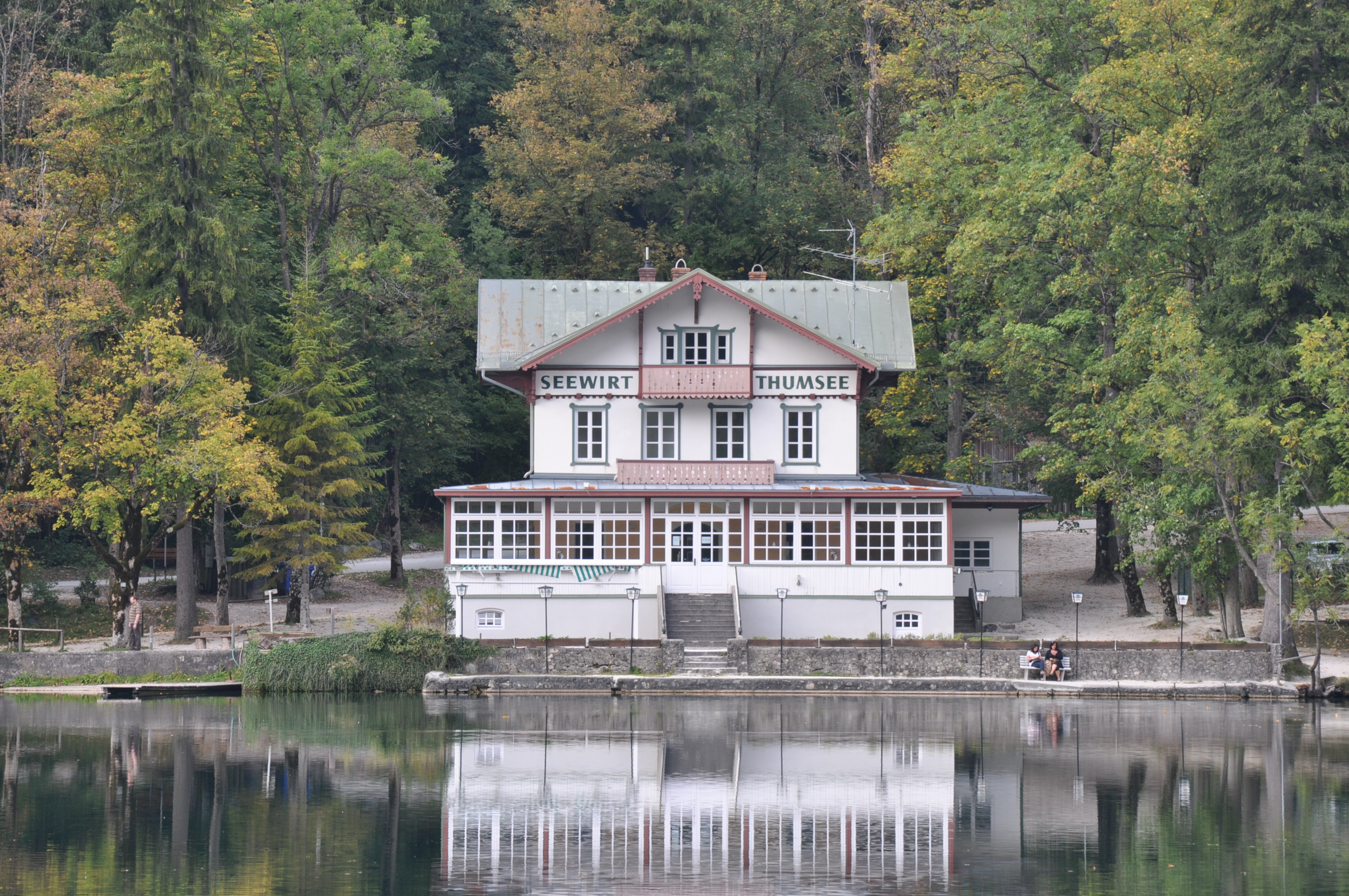 Gasthaus Seewirt am Thumsee bei Bad Reichenhall Jahr 1873; inzwischen leerstehend Aktennummer: D-1-72-114-221